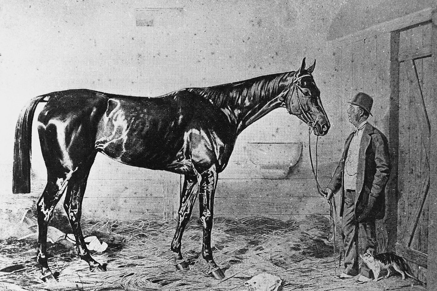 Kincsem a magyar csodakanca legkedvesebb társa egy fekete-fehér nőstény macska volt, amely minden versenyére elkísérte a híres versenylovat. Legendák keringtek arról, hogy milyen kétségbeesetten kereste Kincsem egész istállószemélyzete a boulogne-i kikötőben az elkóborolt macskát.